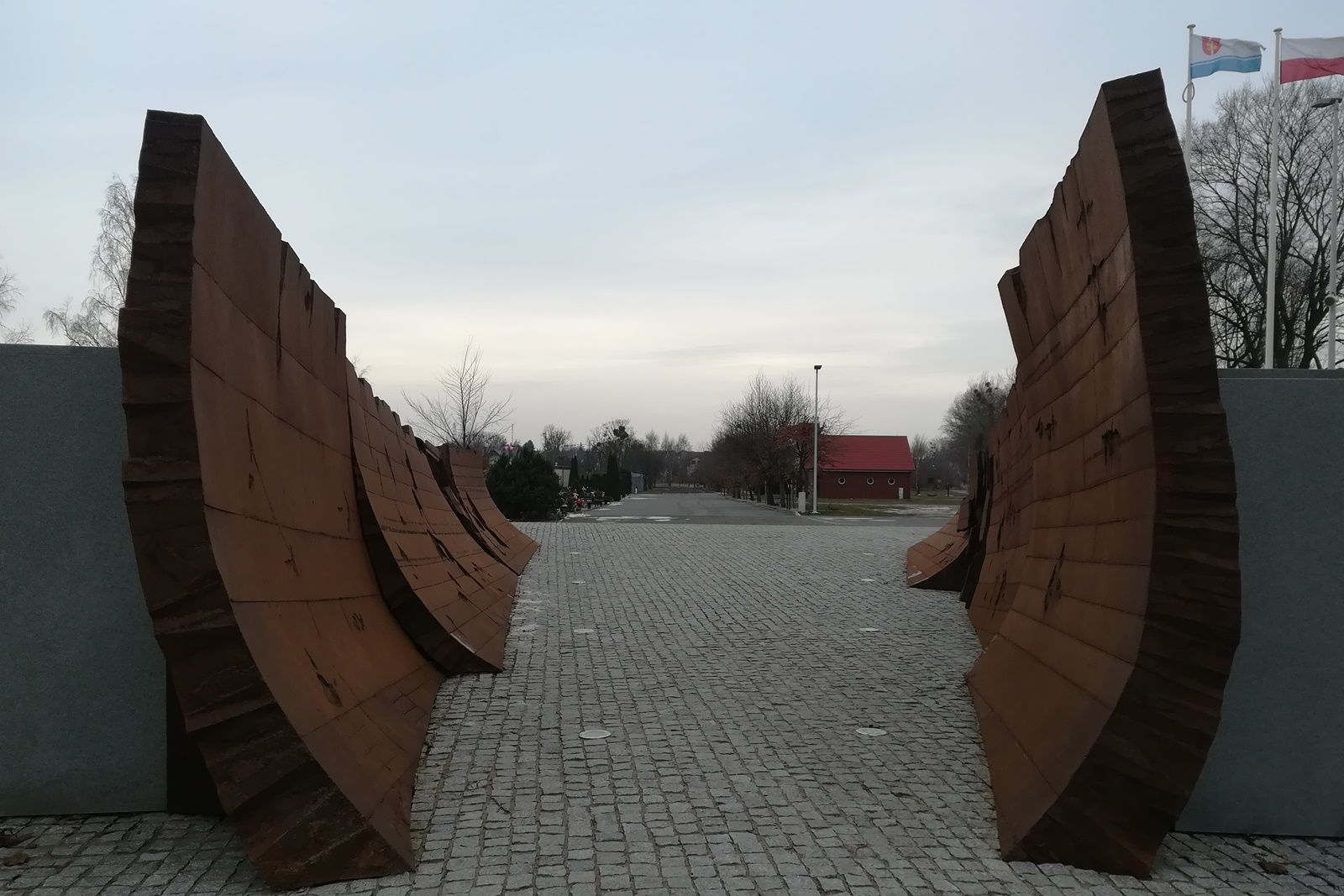 Cmentarz Marynarki Wojennej_Kwatera Pamięci_03